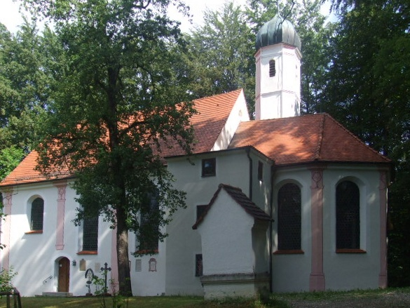 Wallfahrtskirche Zur Schmerzhaften Muttergottes, Matzenhofen, Gemeinde Unterroth, Landkreis Neu-Ulm Außenansicht